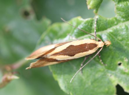 Harpella forficella am 26. Mai 2018 an einer Schlehe in Walldorf/Baden